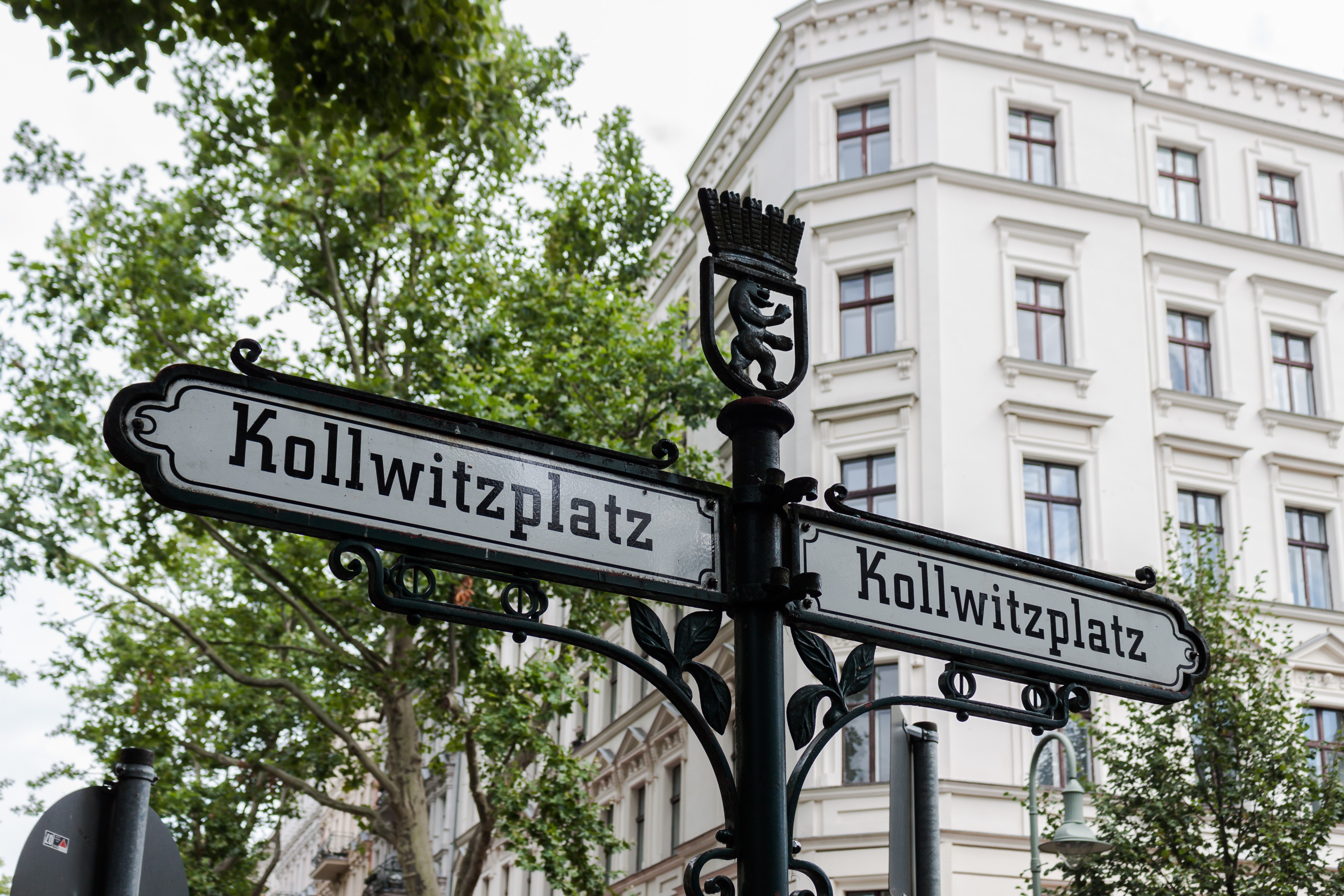 Straßenschild des Kollwitzplatzes in Berlin-Prenzlauer Berg.